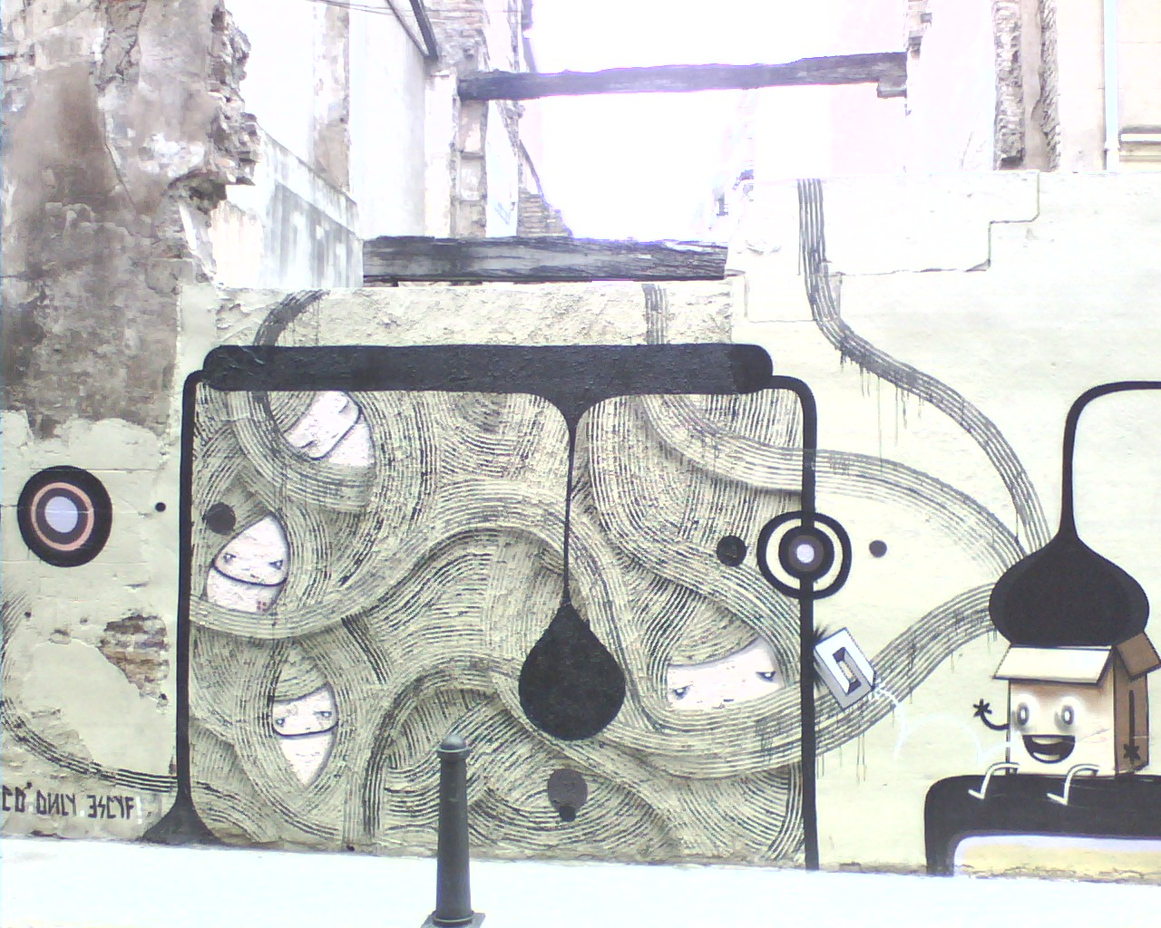 Un grafitti en el Barrio del Carmen, Valencia. Foto de 2006